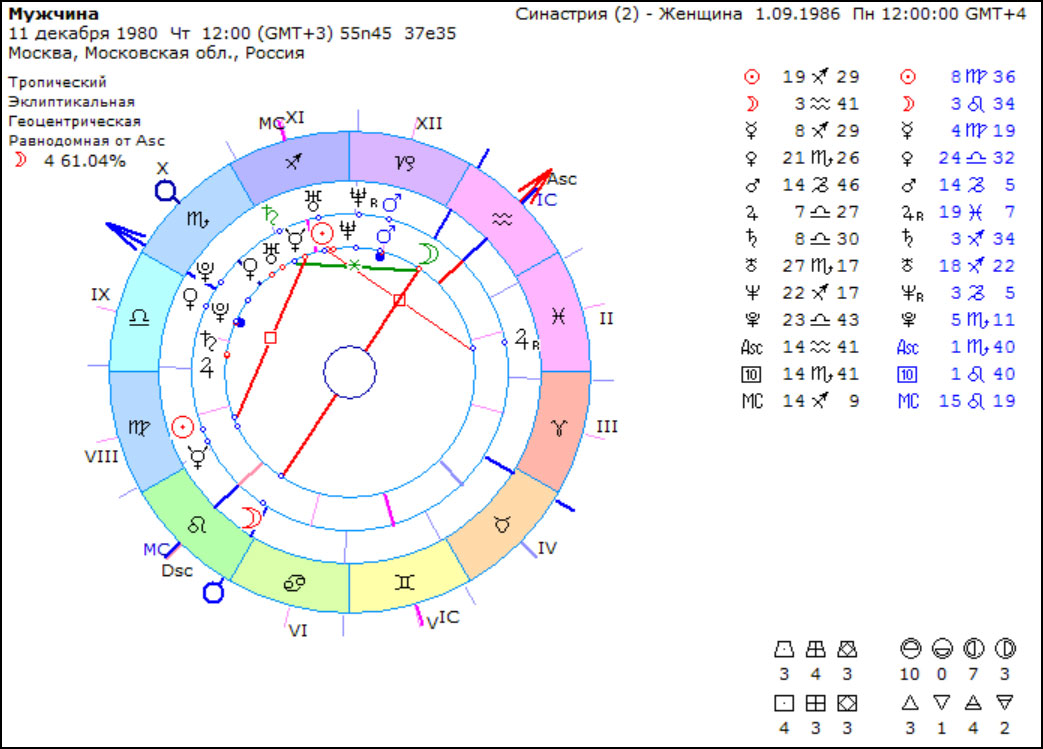 Гороскоп совместимости